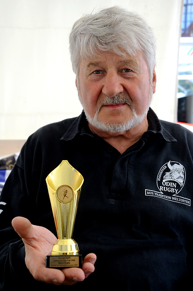 Für den 10. bis 12. Juli 2015 organisierte Horst Josch vom SV Odin von 1905 anlässlich der Hannover City Cup summer games die mittlerweile „Dritte offene Deutsche Beachrugby-Meisterschaft 2015“, Austragungsort ist der Platz der Goseriede zwischen dem Tiedthof, dem Anzeiger-Hochhaus und der Nikolaikapelle in Hannover. Auf diesem Foto präsentiert Horst Josch, zugleich Integrationsbeauftragter, Projektentwickler und Sponsorenbetreuer vom SV Odin von 1905 den Pokal, den alle teilnehmenden Schulgruppen überreicht bekommen sollen ...